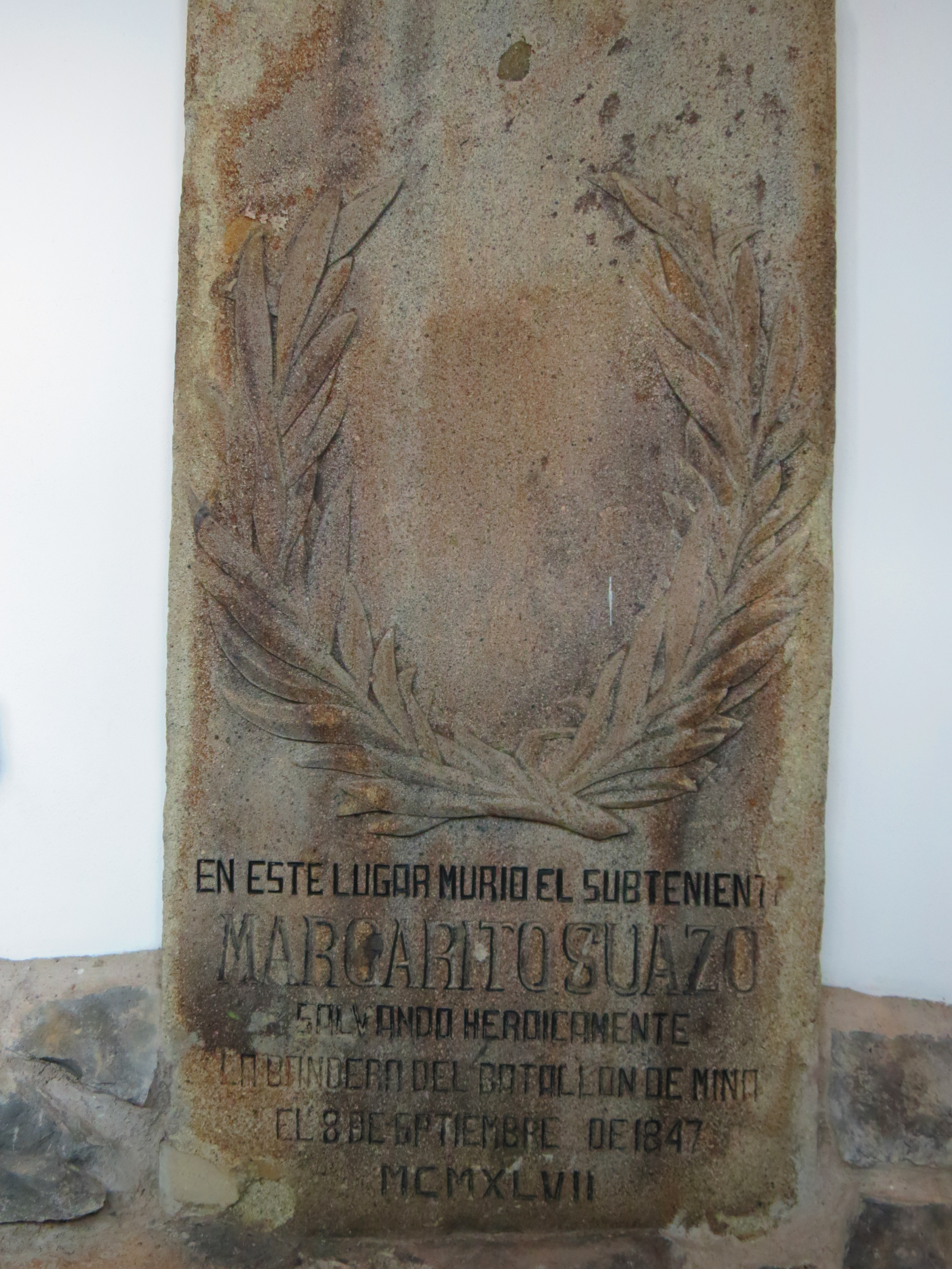 Los Pinos como Centro Cultural